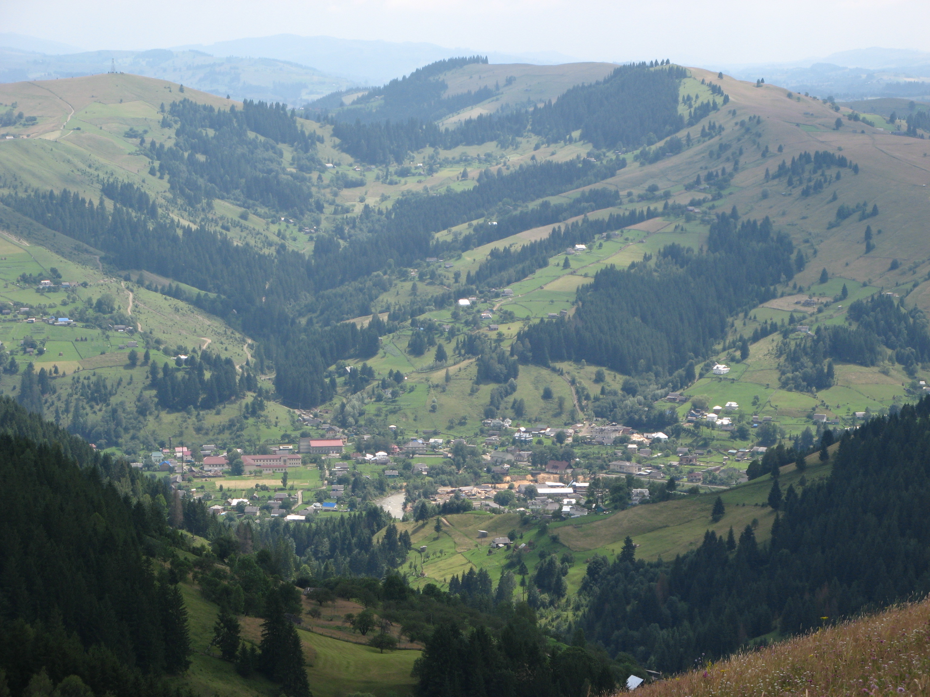 с. Довгопілля (Путильський р-н)